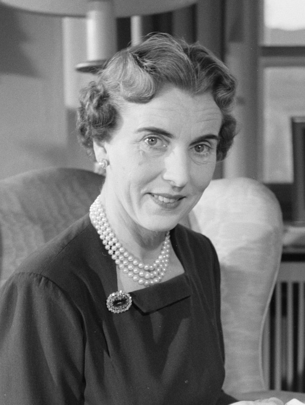 Collectie / Archief : Fotocollectie Van de Poll Reportage / Serie : Gezinsfoto's van de Deense koninklijke familie Beschrijving : Deense Koningin bordurend in haar woning in paleis Brockdorff in Slot Amalienborg Datum : maart 1954 Locatie : Denemarken, Kopenhagen Trefwoorden : borduren, interieurs, koninginnen, meubilair, paleizen, stoelen Persoonsnaam : Ingrid (koningin Denemarken) Fotograaf : Poll, Willem van de, [onbekend] Auteursrechthebbende : Nationaal Archief Materiaalsoort : Negatief (zwart/wit) Nummer archiefinventaris : bekijk toegang 2.24.14.02 Bestanddeelnummer : 252-8636